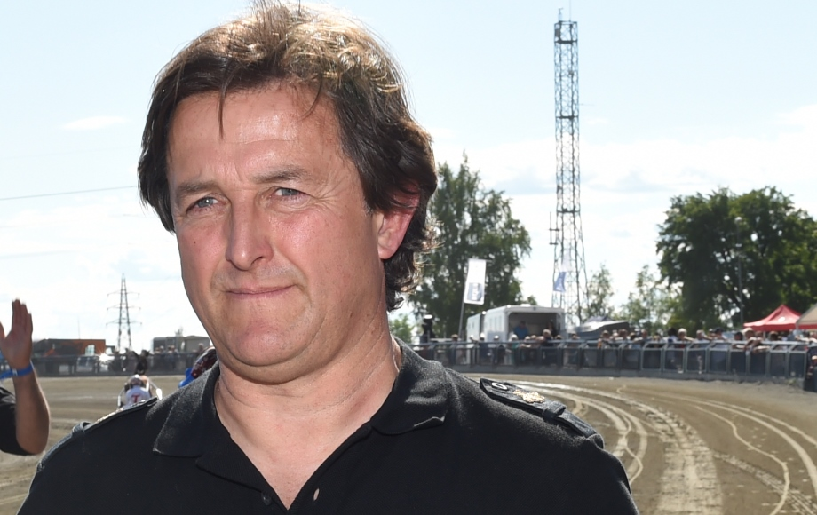 foto : lars jakobsson/kanal75